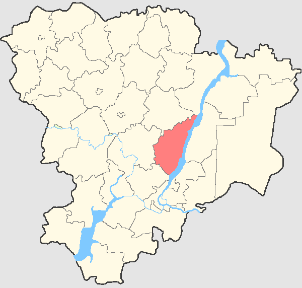 Дубовский район на карте Волгоградской области